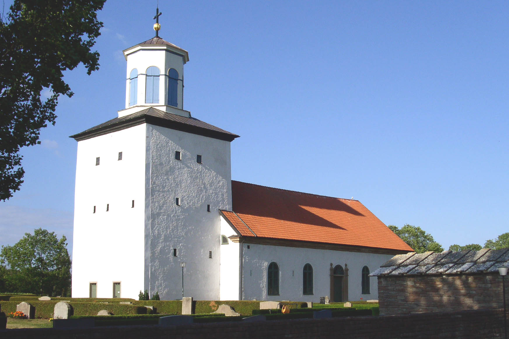 Föra kyrka på Öland (Växjö stift)